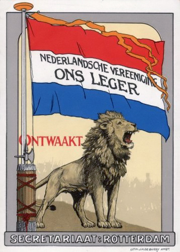 Ansichtkaart uit de Eerste Wereldoorlog ter gelegenheid van de Nederlandse mobilisatie van 1914. 1 januari 1914